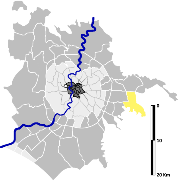 Borghesiana